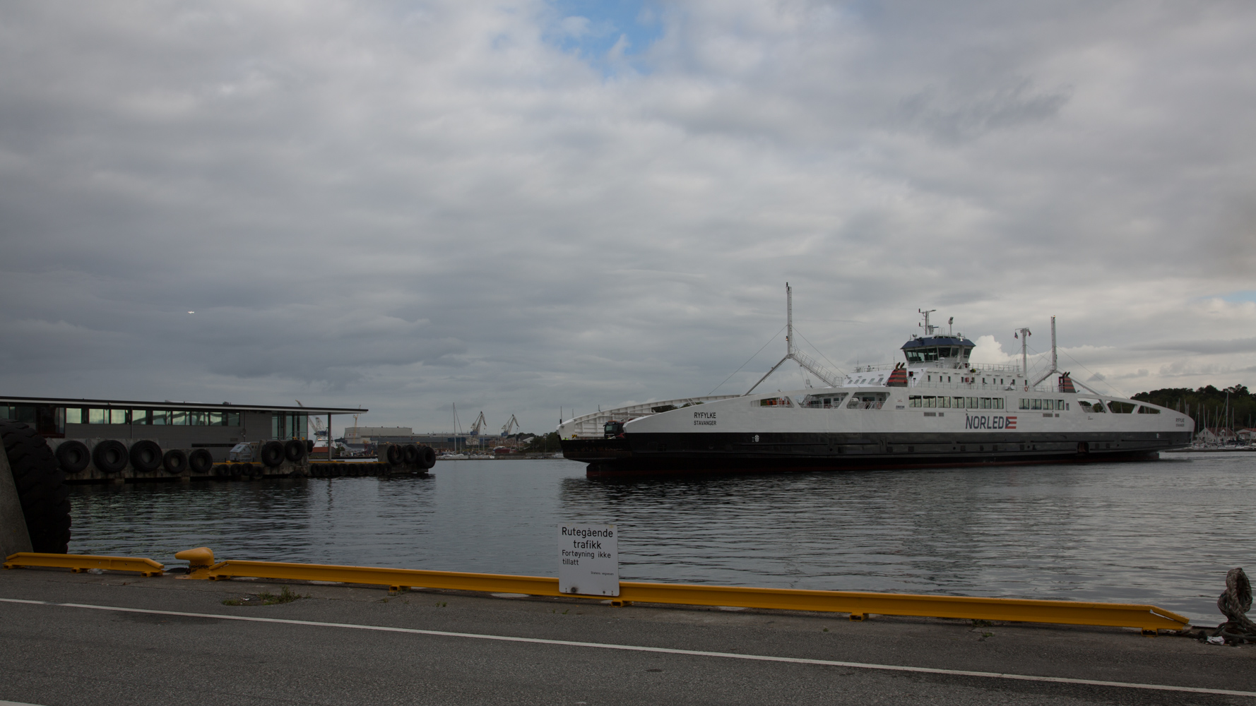 BJ7A9246.jpg